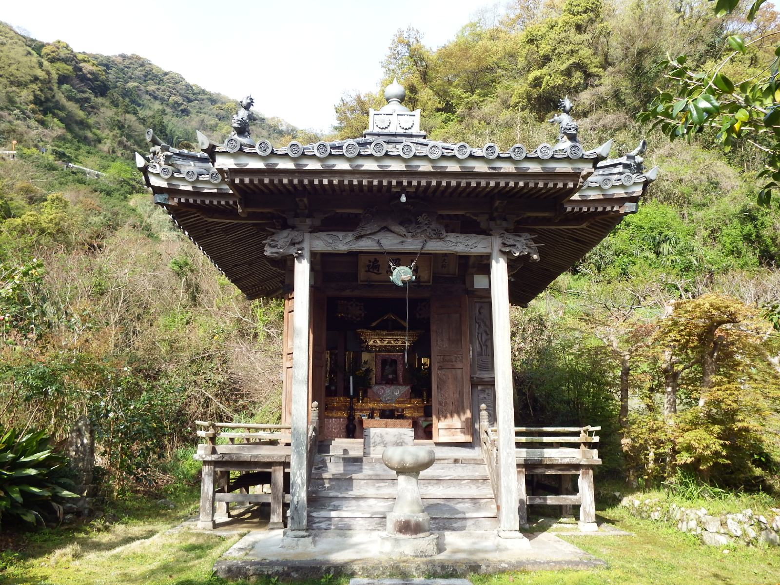 九島の鯨大師